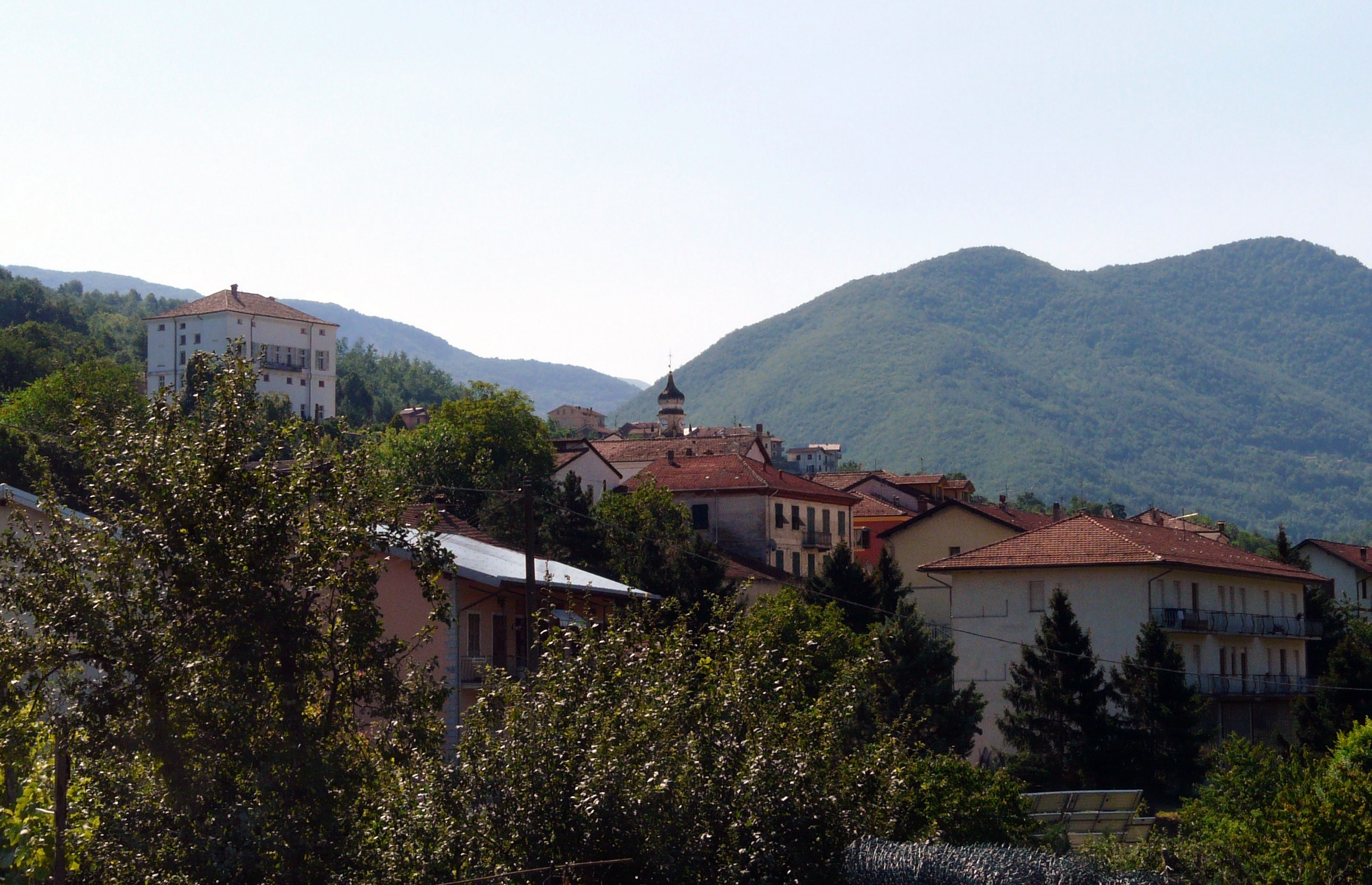 Panorama di Cabella Ligure, Piemonte, Italia